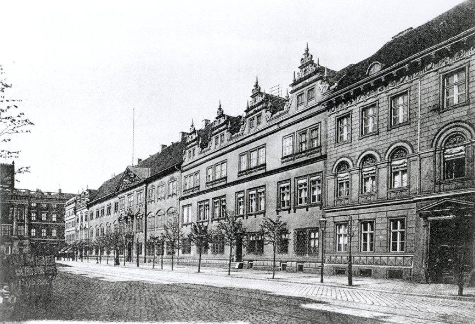 Alter Marstall von Berlin 1670, Photo von 1890